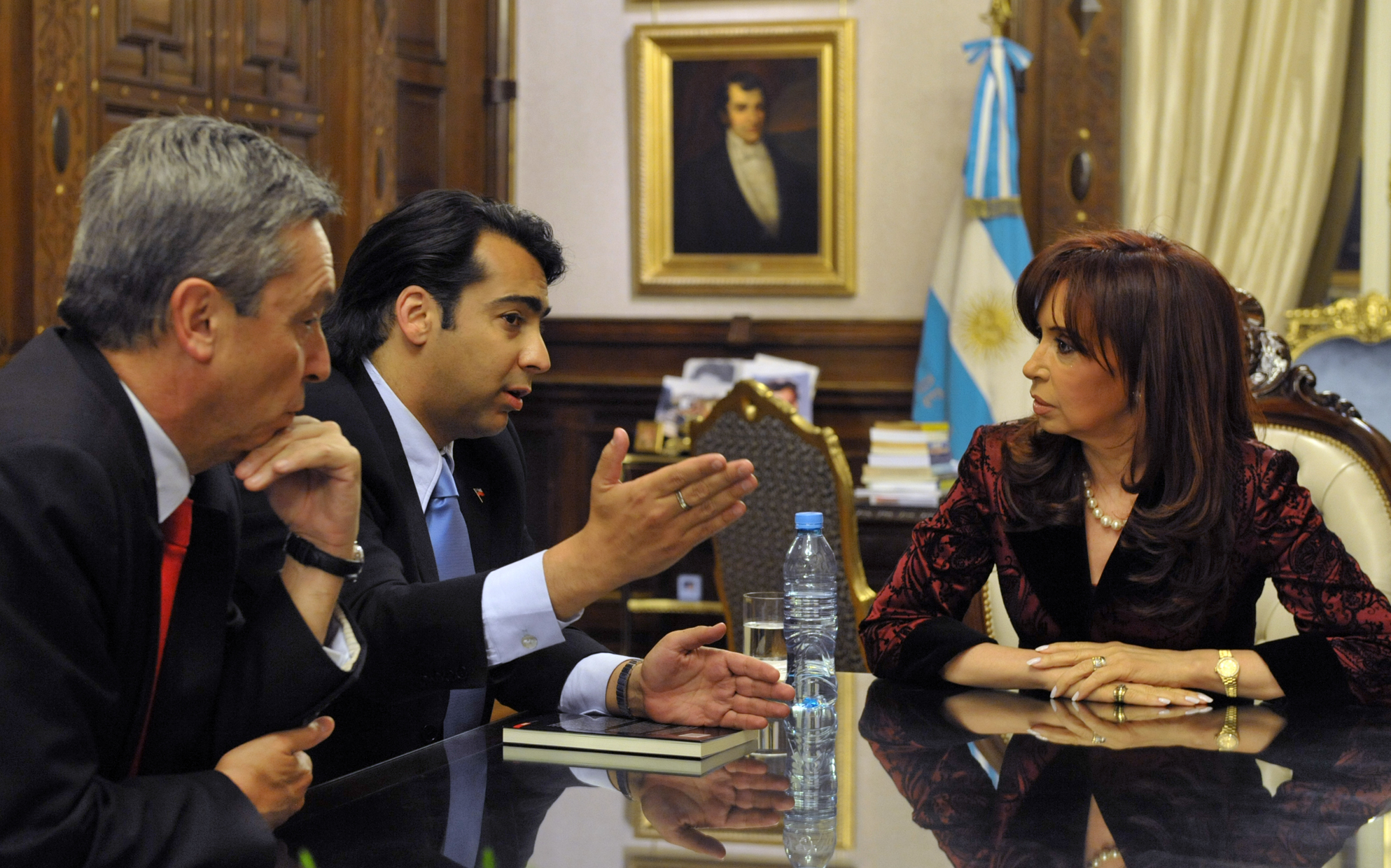 La Presidenta de Argentina Cristina Fernández, junto al candidato a la presidencia de Chile, Marco Enriquez-Ominani.